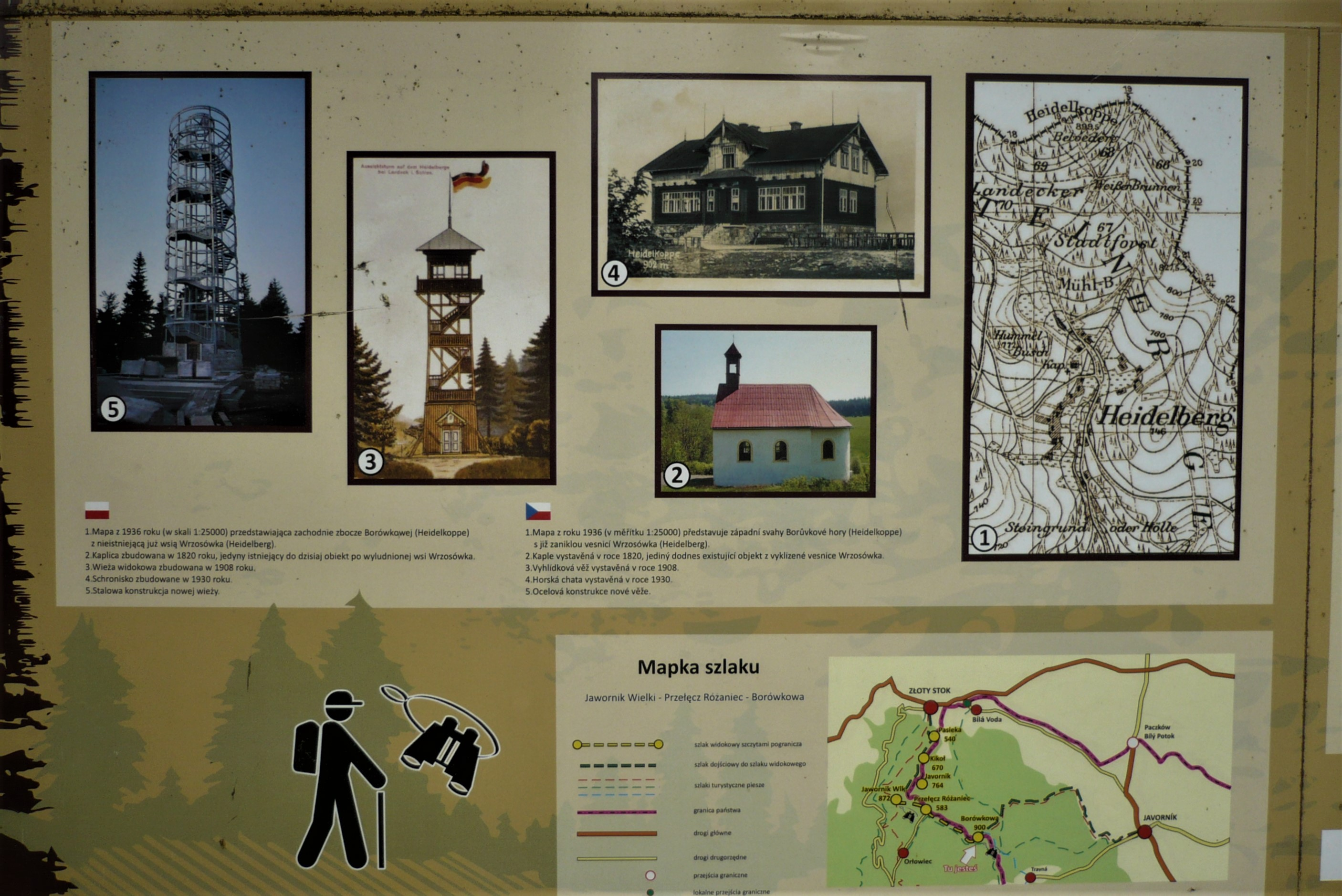 Borówkowa. Tablica